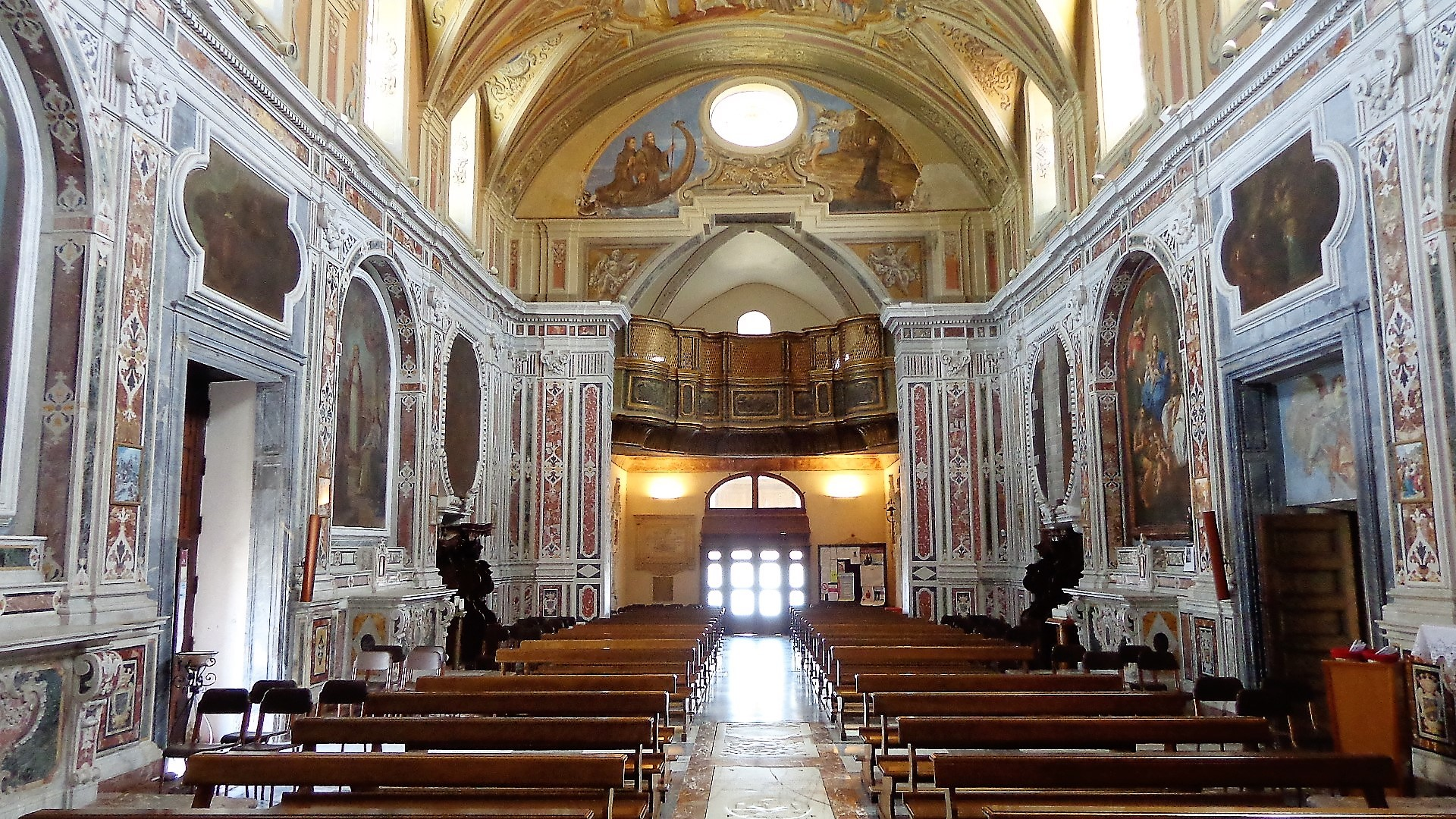 Navata